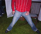 Självporträtt på Användare:Knuckles